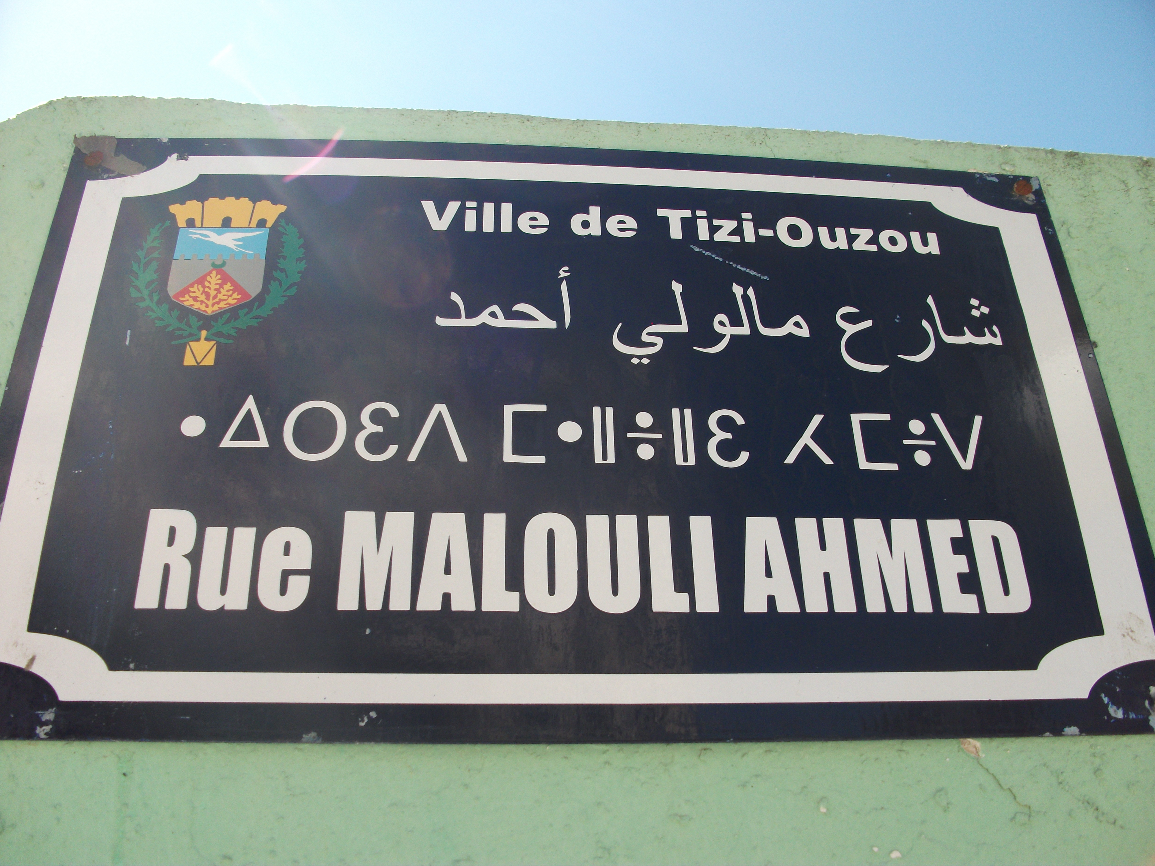 Nouvelle plaque de rue installée à Tizi Ouzou